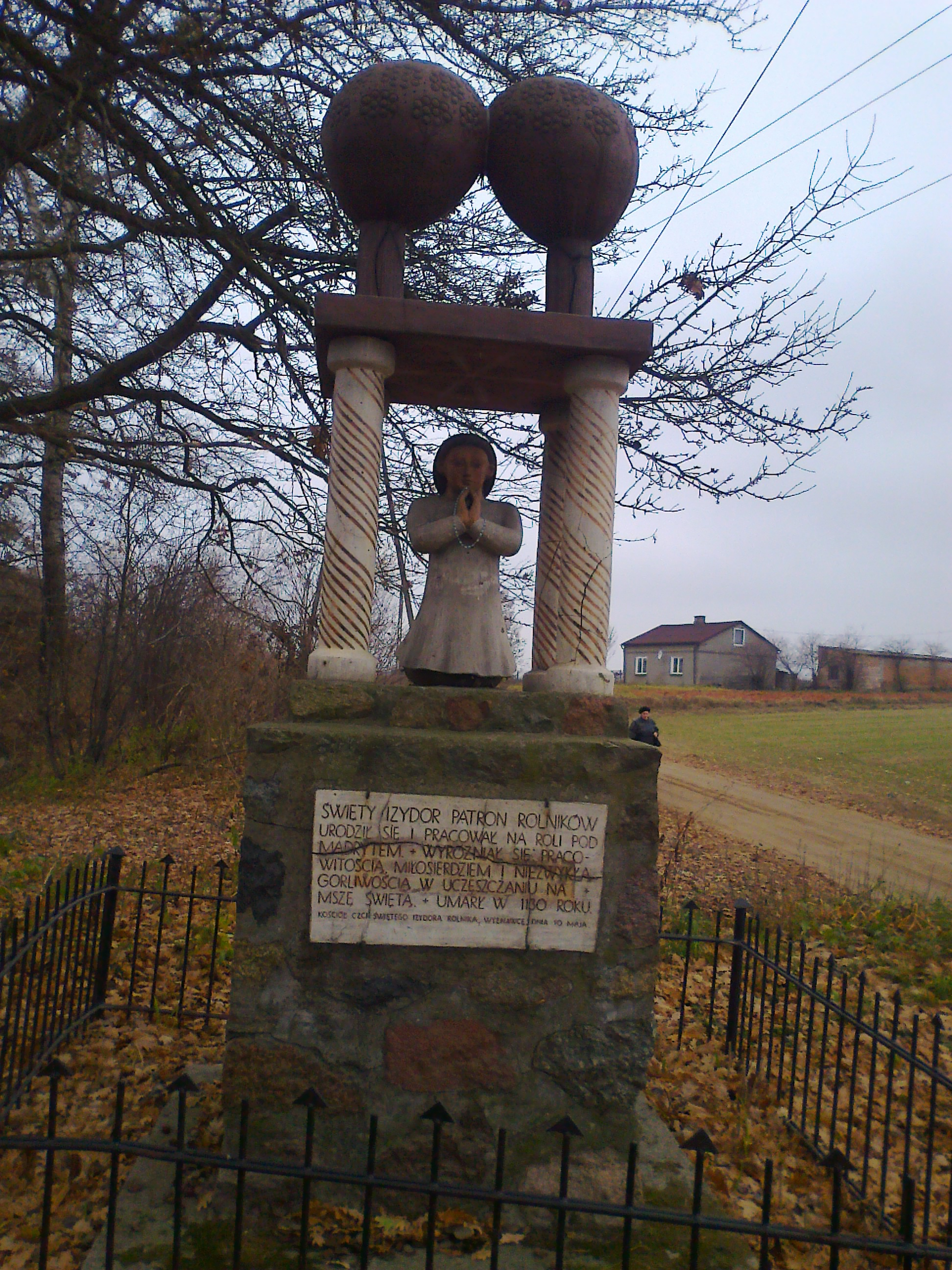 kapliczka Św. Izydora w Smoszewie (woj. mazowieckie, gm. Zakroczym)